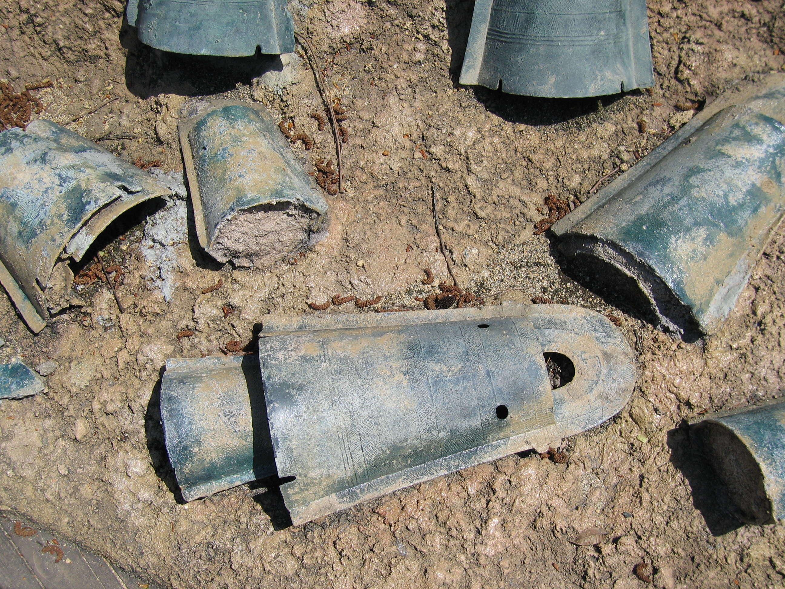 Doutaku_in_Kamoiwakura_ruins